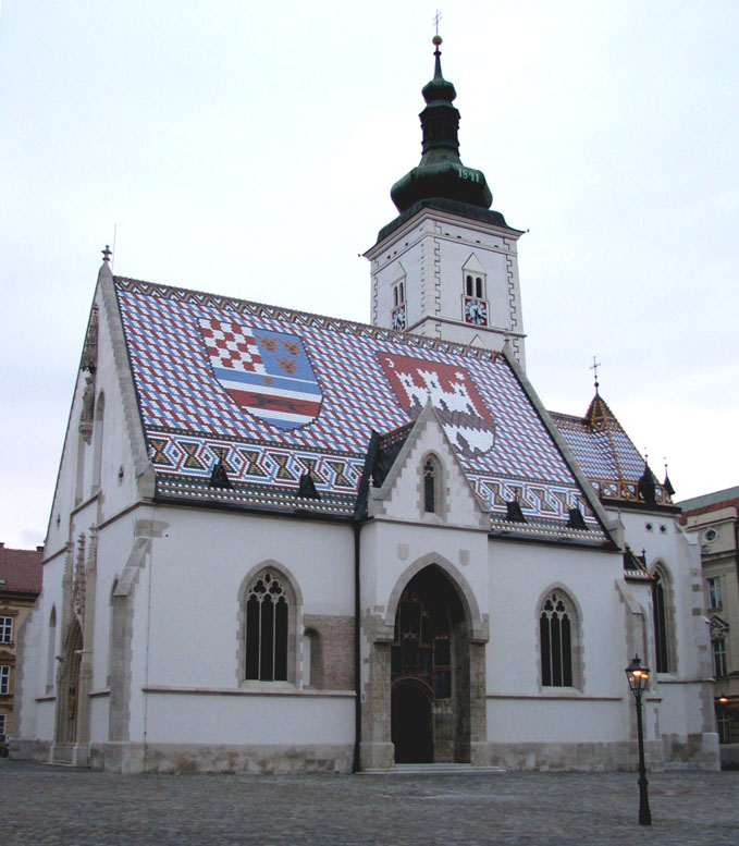 Crkva sv. Marka u Zagrebu